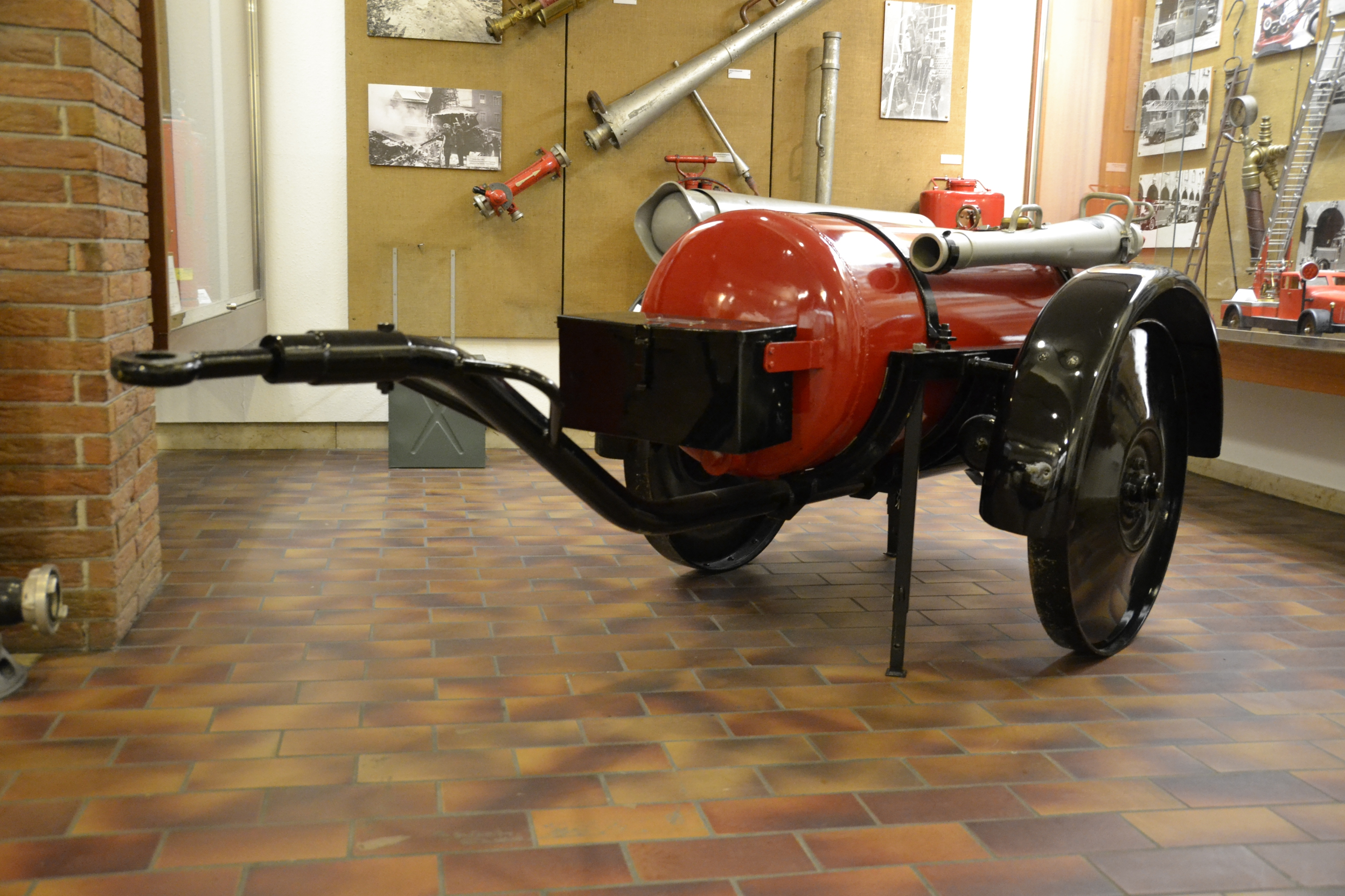 Ausstellungsstücke des Feuerwehrmuseums München: Schaummittelanhänger mit Kometrohr